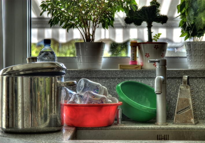 Věra Stuchelová´s photographs